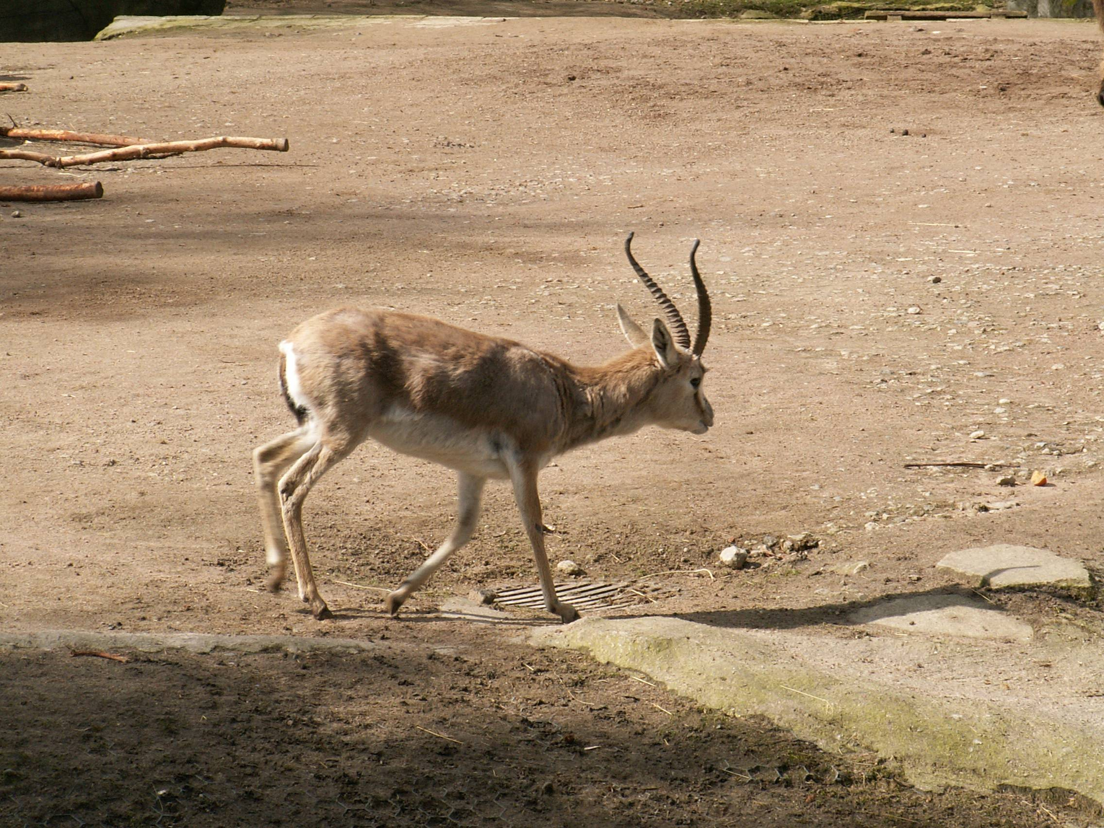 Gazella subgutturosa subgutturosa, Bock, Persische Kropfgazelle, aufgenommen in Hagenbecks Tierpark, Hamburg, Deutschland.